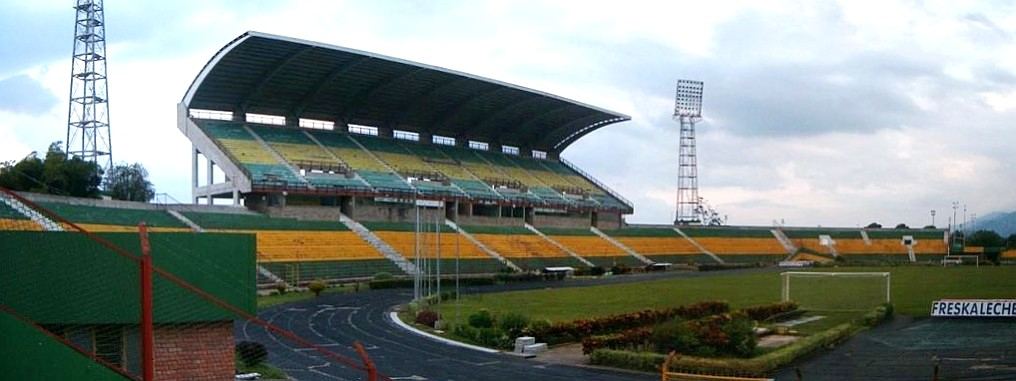 Estadio Alfonso López, capacidad de 25.000 espectadores